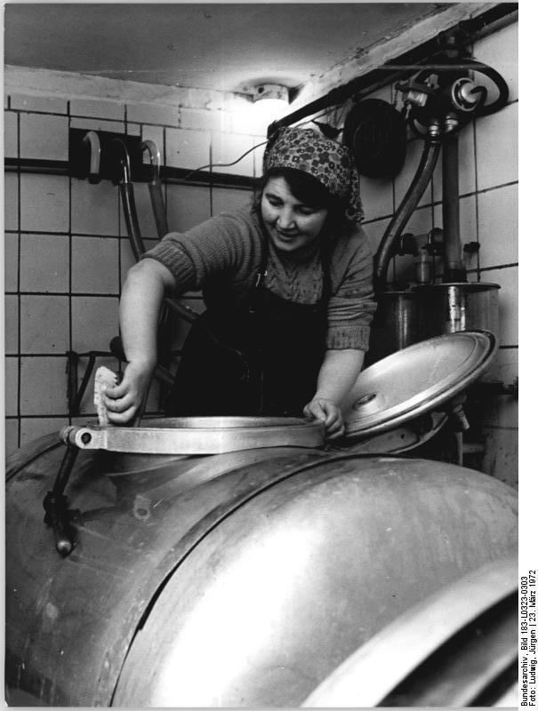 Oßmannstedt, Bäuerin in der Milchkammer ADN-Zentralbild Ludwig-23.3.1972 Bez. Erfurt: Genossenschaftsbäuerin Helga Schablick. Geachtet und geschätzt ist Helga Schablick als vorbildliche Melkerin in der LPG Freundschaft der Kooperation Oßmannstedt. Melkerin Helga Schablick beim Reinigen eines Tanks, in dem die Milch in die Molkerei geliefert wird. Auf ihrem Meisterlehrgang erwirbt sich Helga Schablick dazu gründliche Kenntnisse. Als Mutter von drei Kindern und als Gemeindevertreterin leistet sie ebenso gute Arbeit.